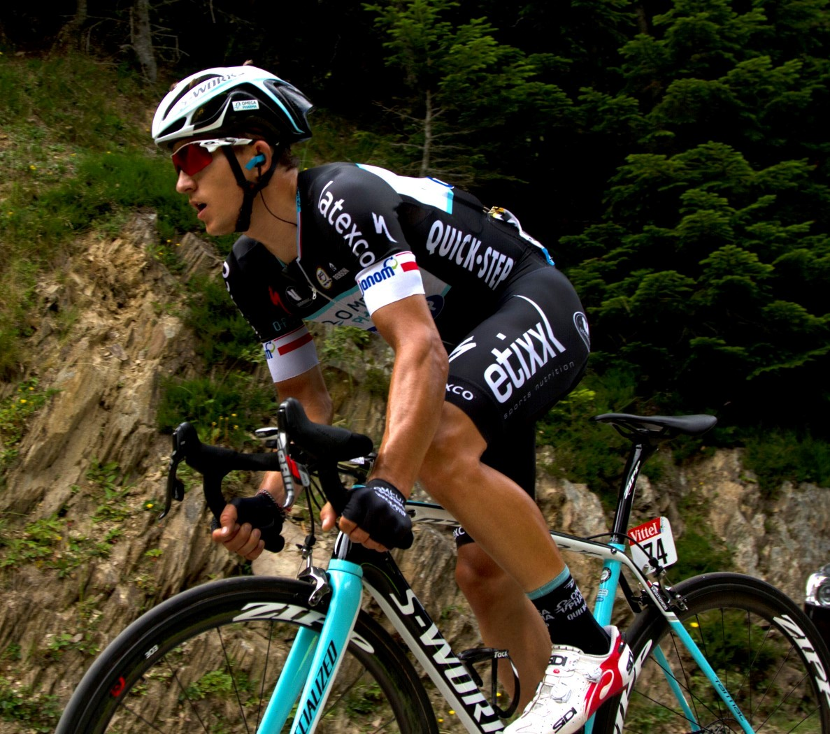 071 kwiatkovsky